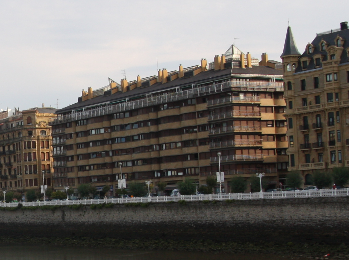 paseo río urumea